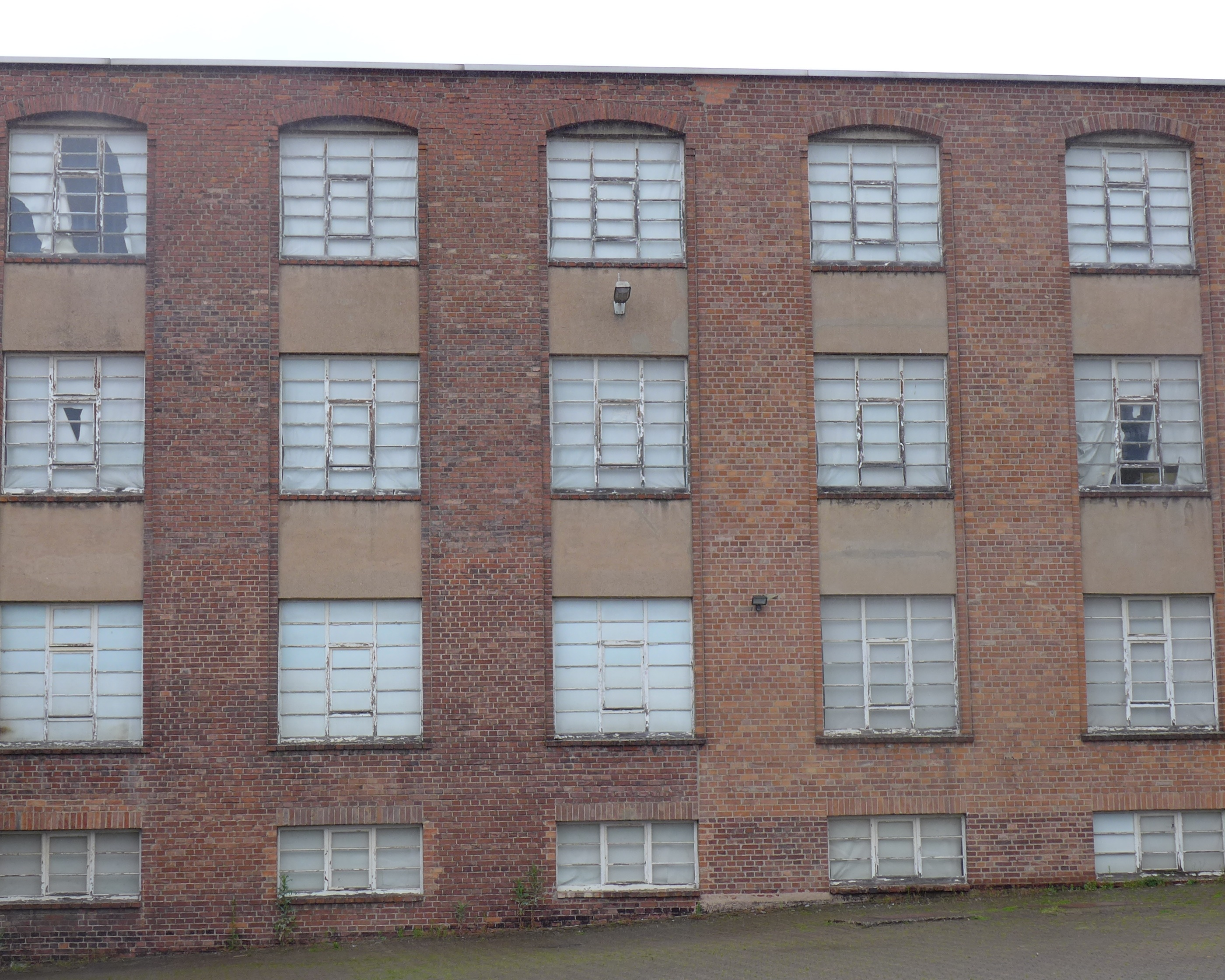 Detail Südseite